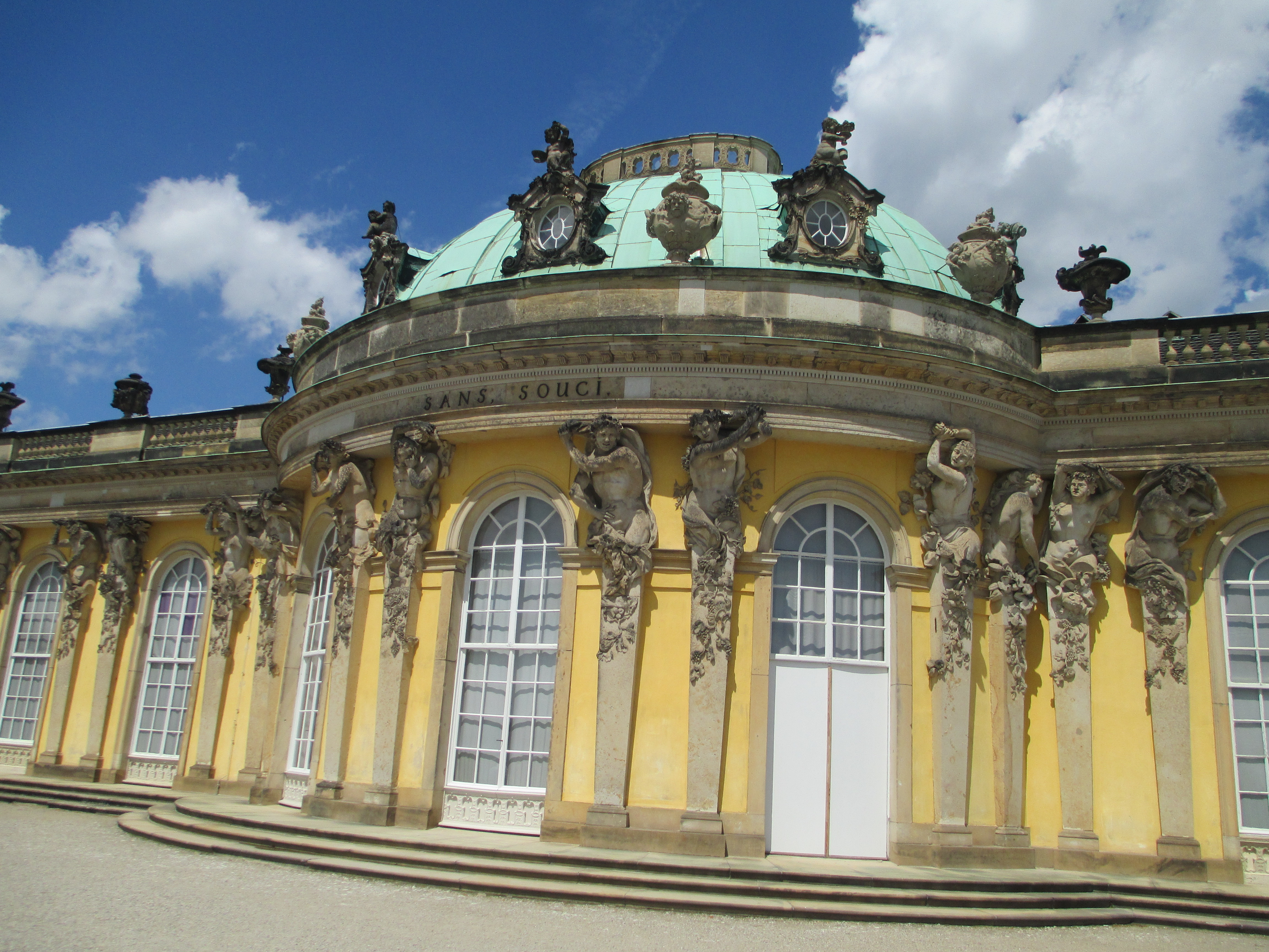 ארמון סנסוסי